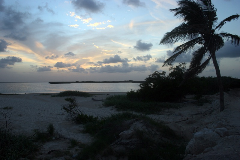 Paisaje de la Reserva de la Biosfera de Sian Ka'an (Quintana Roo, México).